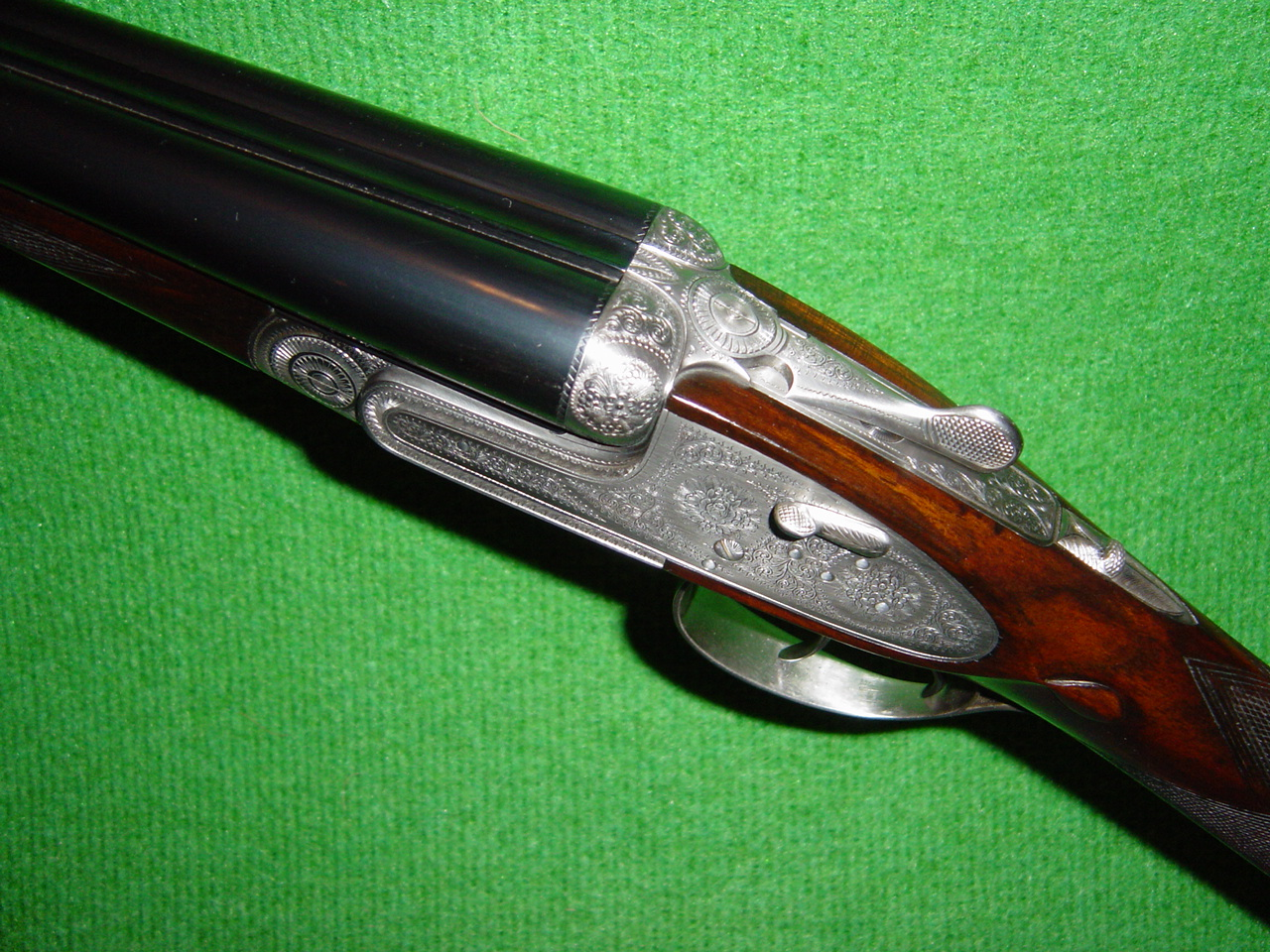 Fusil juxtaposé GRULLA calibre 20 platines démontables